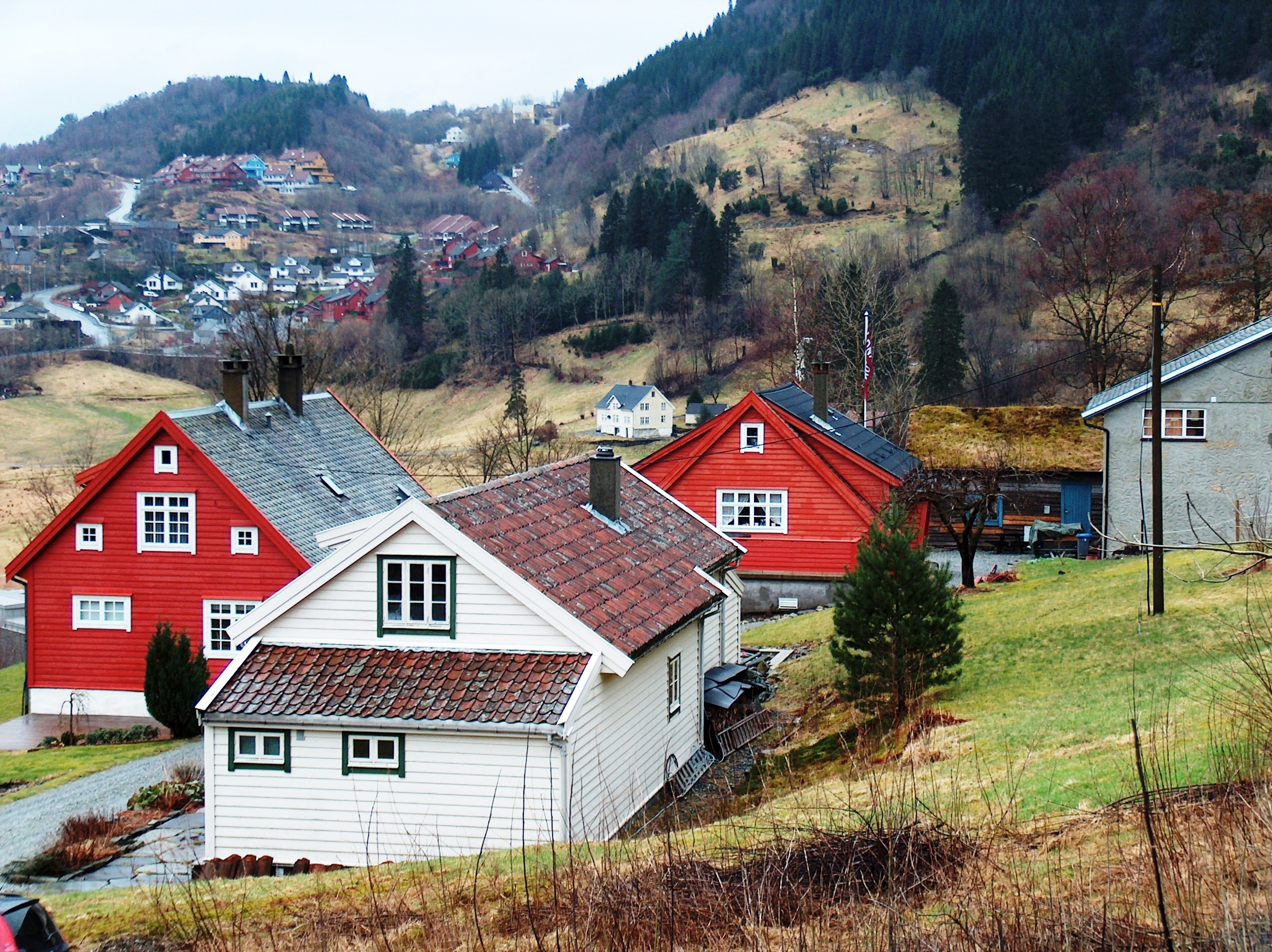 Ådnatun museum